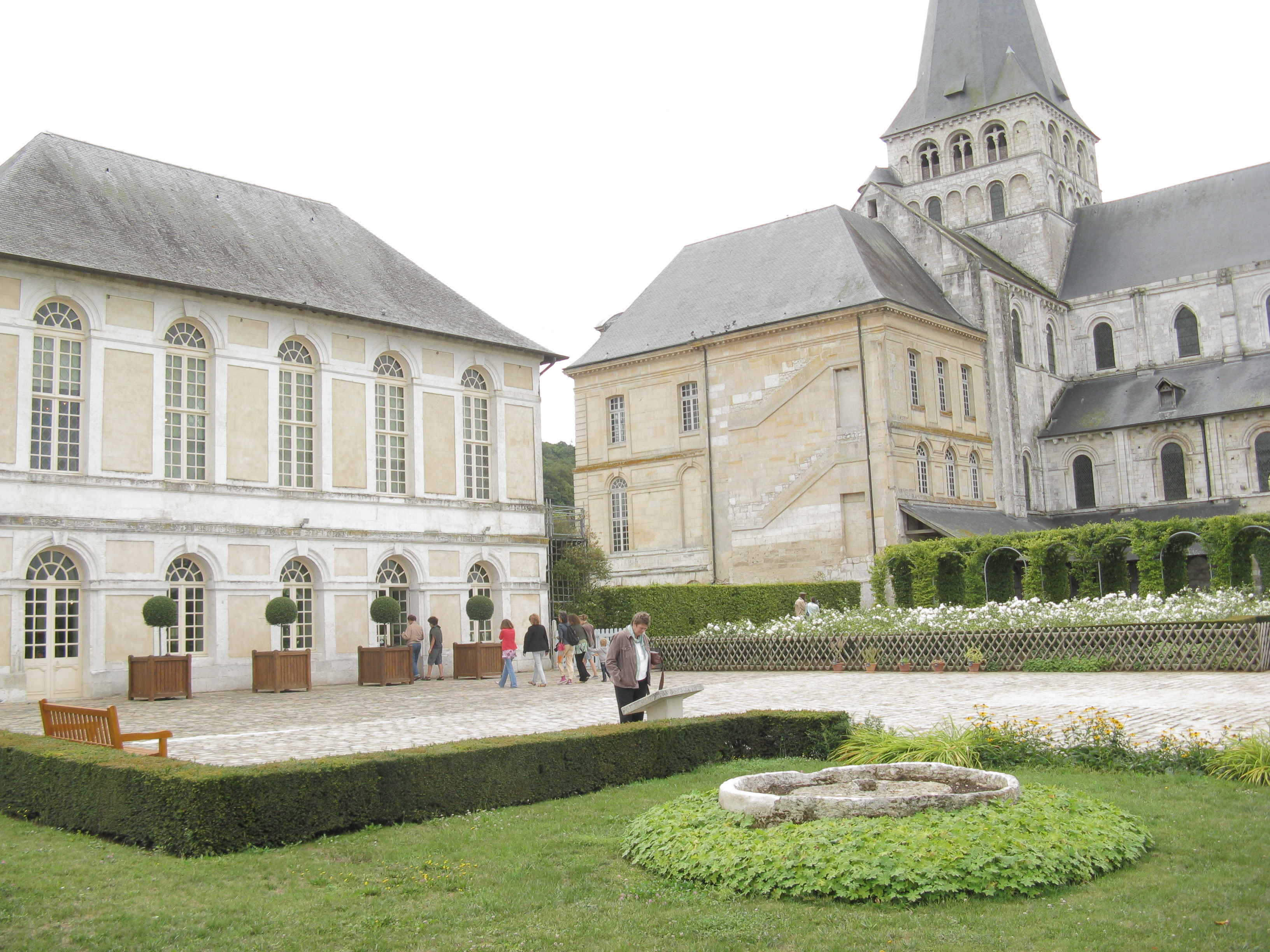 Abdij Saint-Georges-de-Boscherville, Saint-Martin-de-Boscherville, Normandië, Frankrijk.